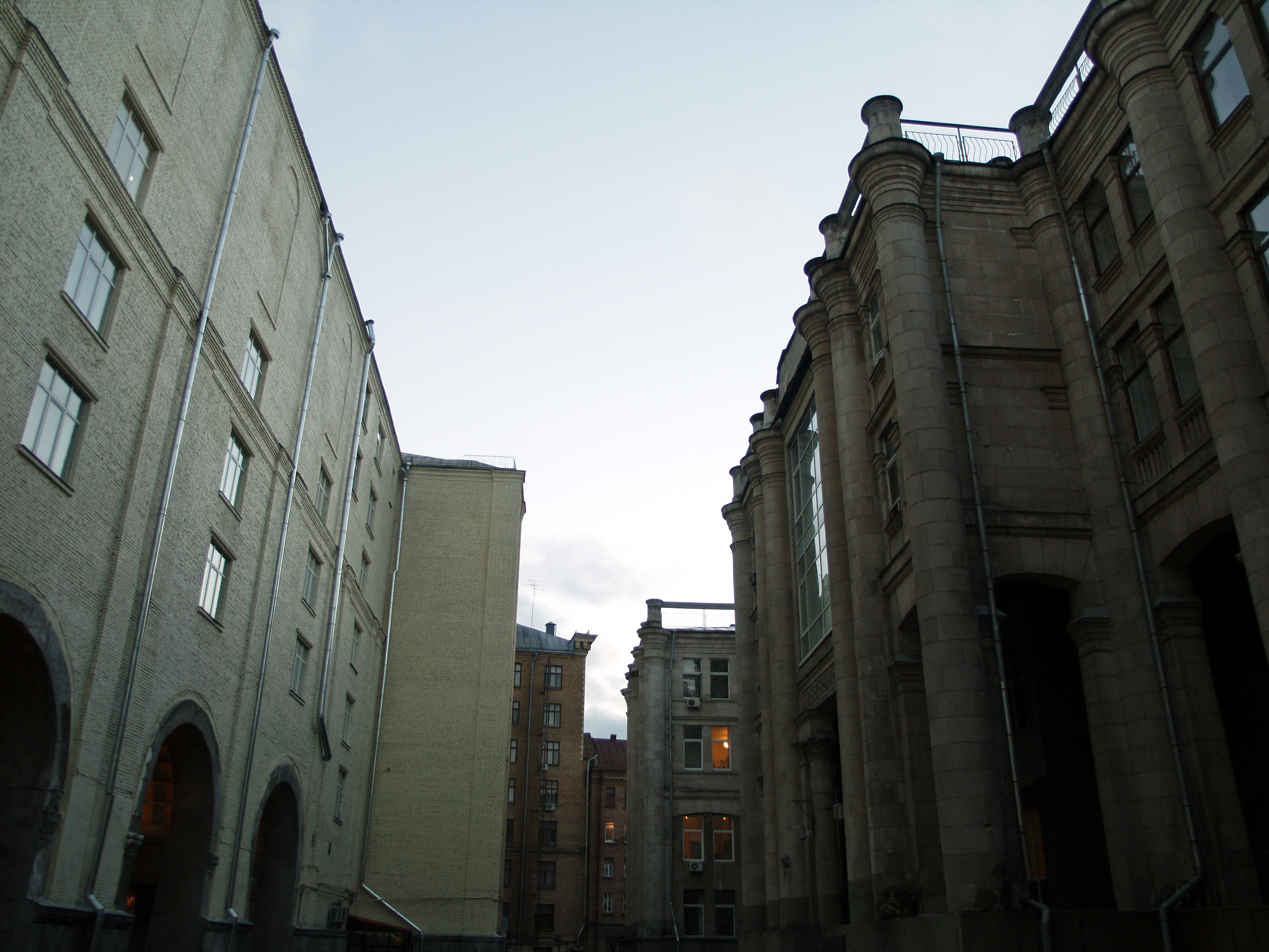 Україна, Київ, Хрещатик - Будинок адміністративний телерадоіокомпанії